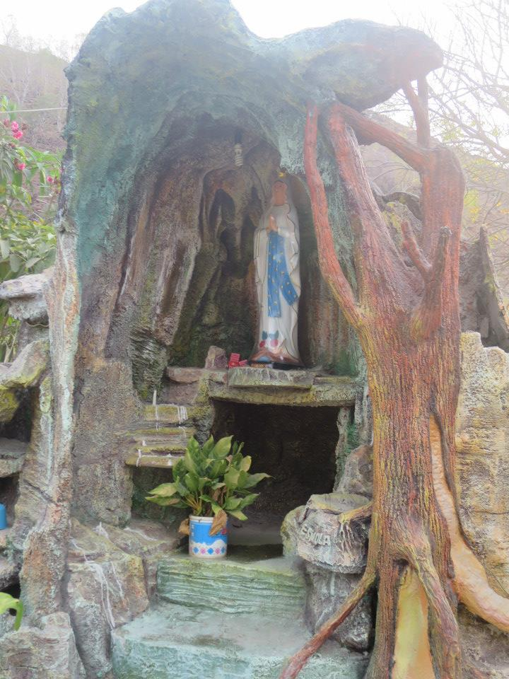 Im Dorf Biacou, Suco Aidabaleten